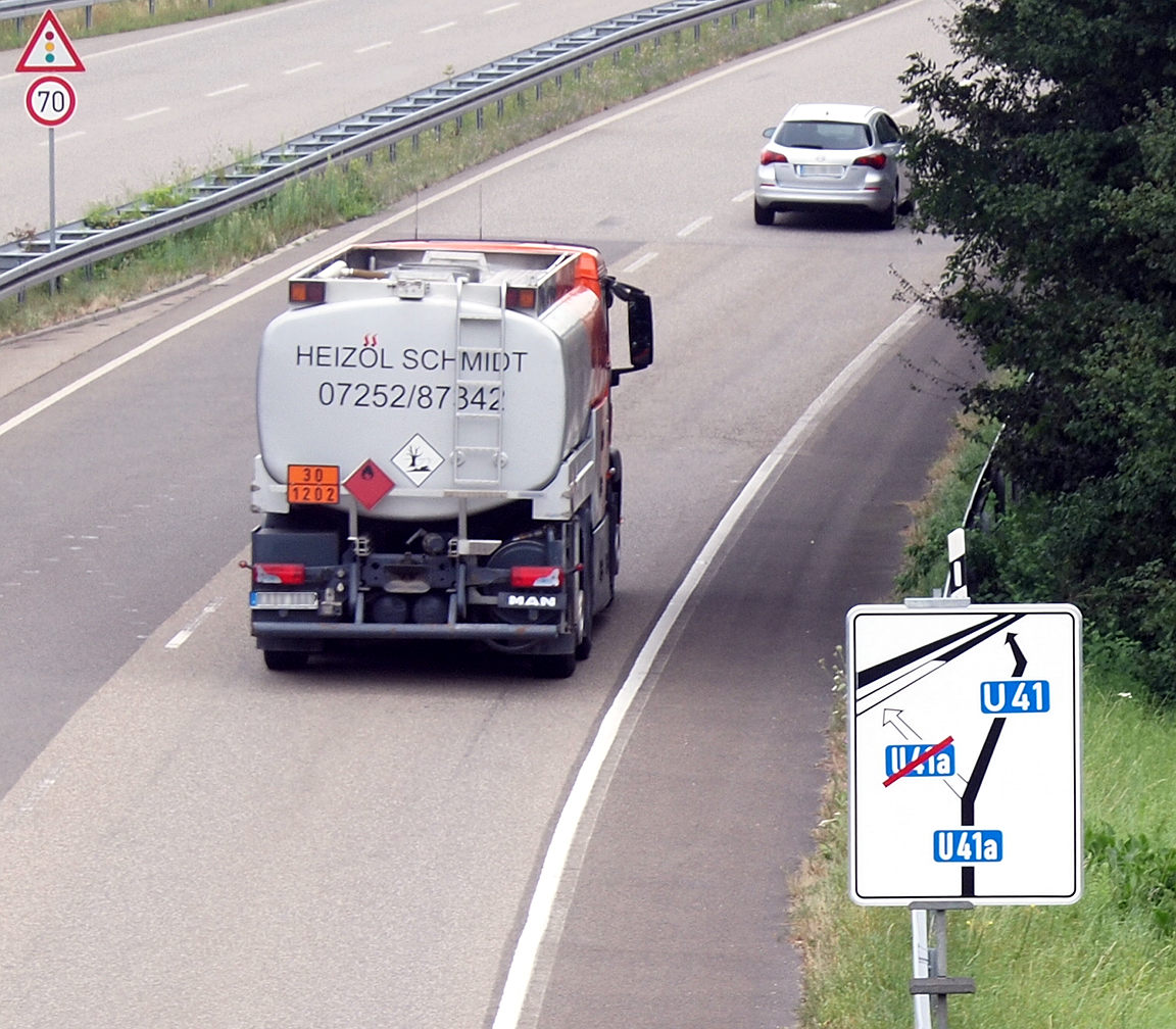 weiterführende Bedarfsumleitung auf der B10 zwischen den Autobahnanschlussstellen Karlsruhe-Durlach und Karlsruhe-Nord der A5